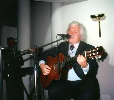 Bruno Lauzi in concerto